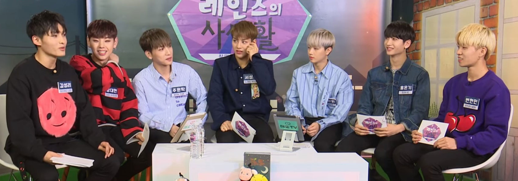 레인즈의 사생활